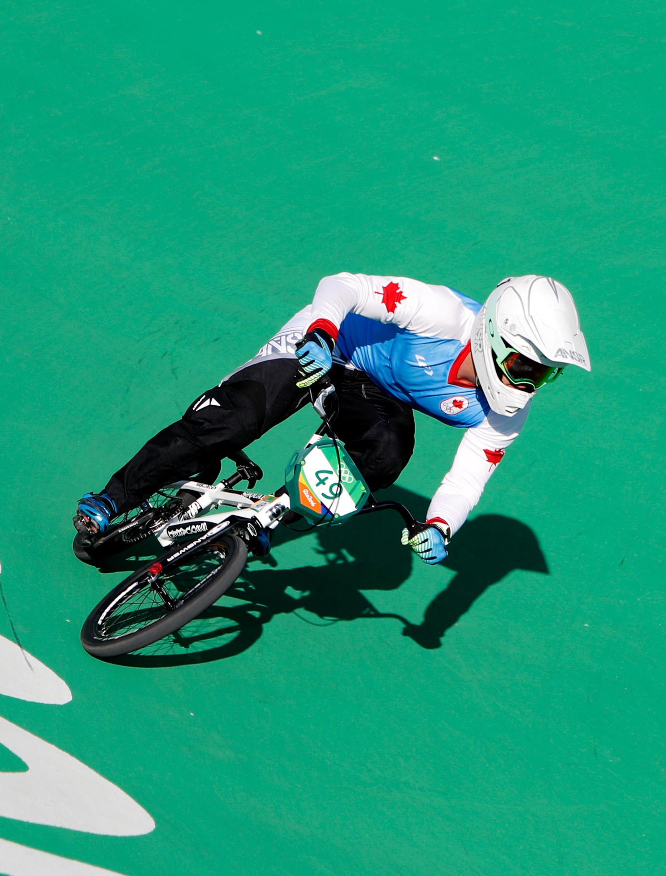 Rio de Janeiro - Ciclista canadense Tony Nyhaug compete BMX nos Jogos Olímpicos Rio 2016, no Parque Radical em Deodoro (Fernando Frazão/Agência Brasil)